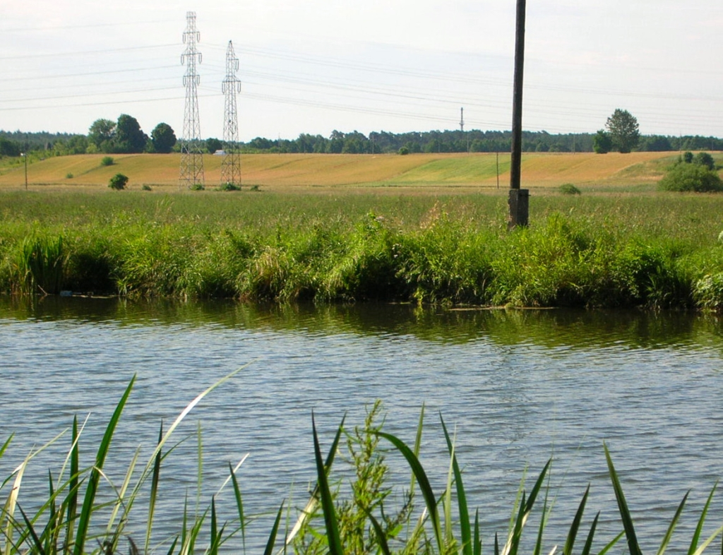 Zbocze pradoliny bydgosko-nakielskiej na os. Prądy w Bydgoszczy